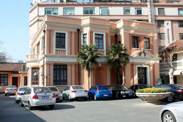 Shanghai, siehe [1]